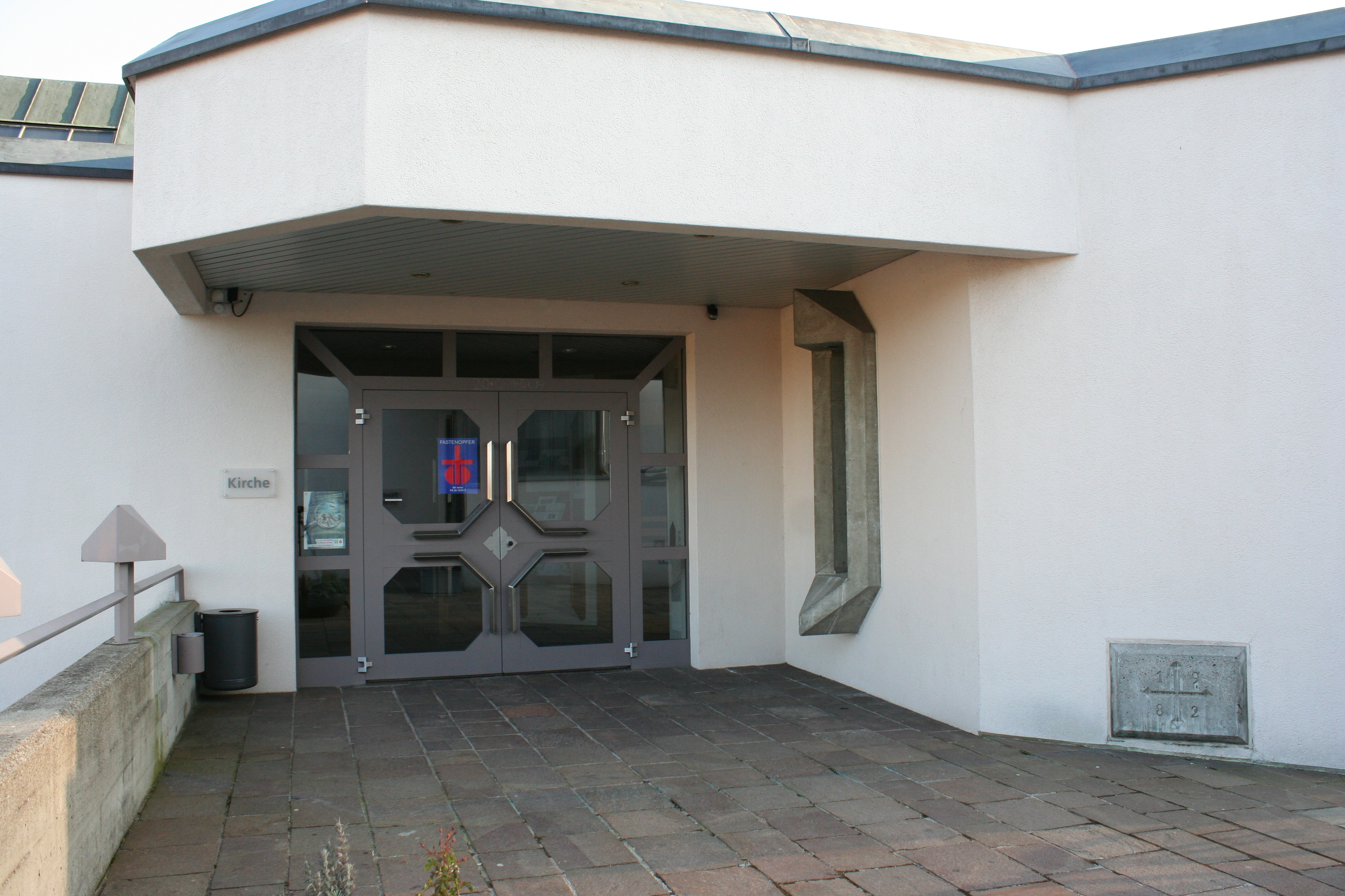 Römisch-katholische Pfarrkirche St. Martin Illnau-Effretikon, Zugang zur Kirche